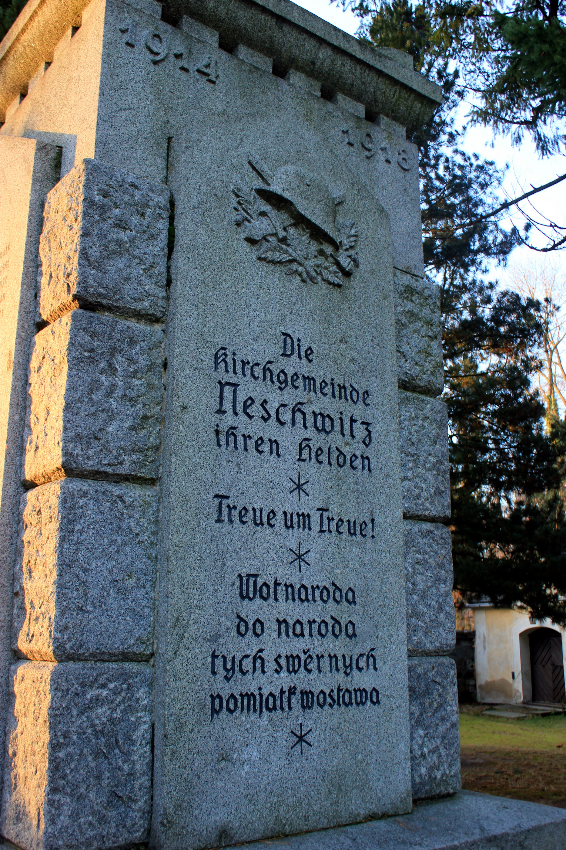 Hornjoserbsce: Wojerski pomnik při cyrkwi w Njeswačidle.